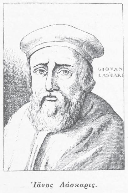 Griechischer Gelehrter, 15. - 16. Jahrhundert